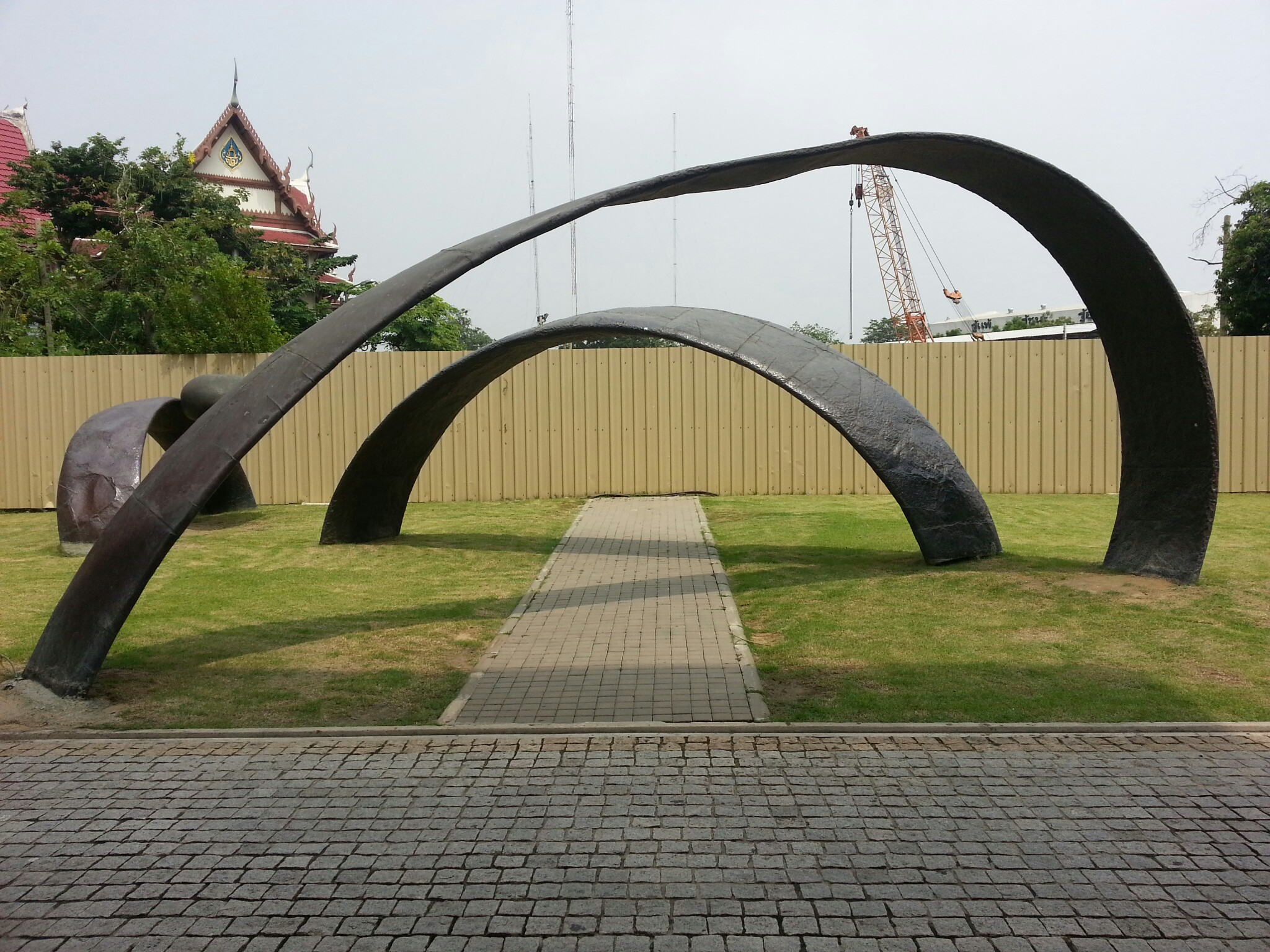 Phra Borom Maha Ratchawang, Phra Nakhon, Bangkok, Thailand